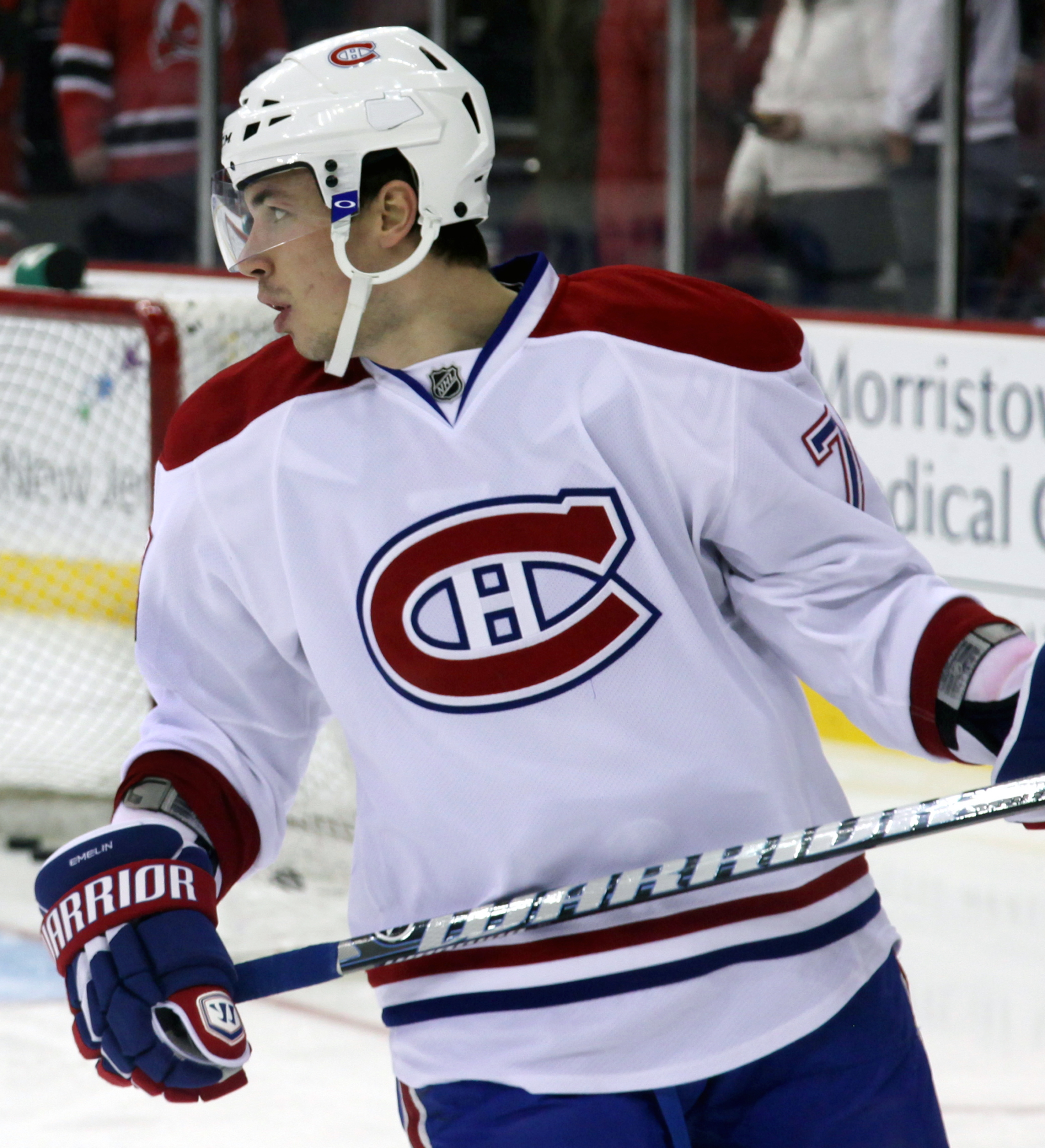 Emelin in 2012.